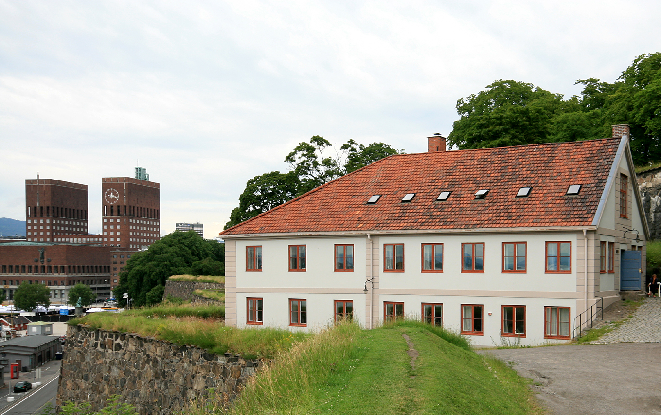 Laboratoriekjøkkenet, Akershus festning, Oslo. Bygd som ensomt fengsel 1836 etter tegninger av ingeniørkaptein Michael Smith Arentz.